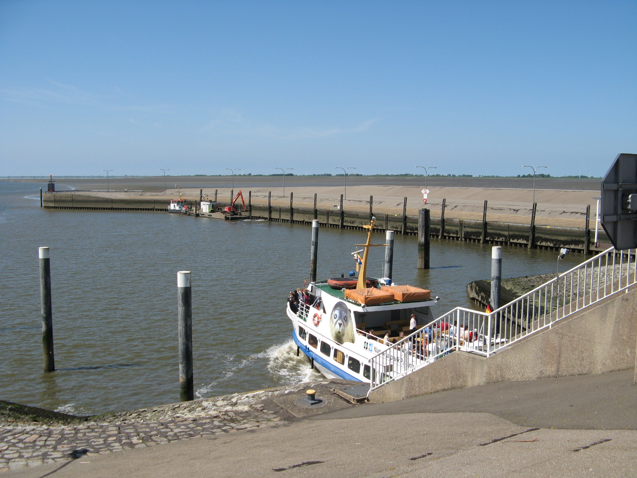 Eidersperrwerk